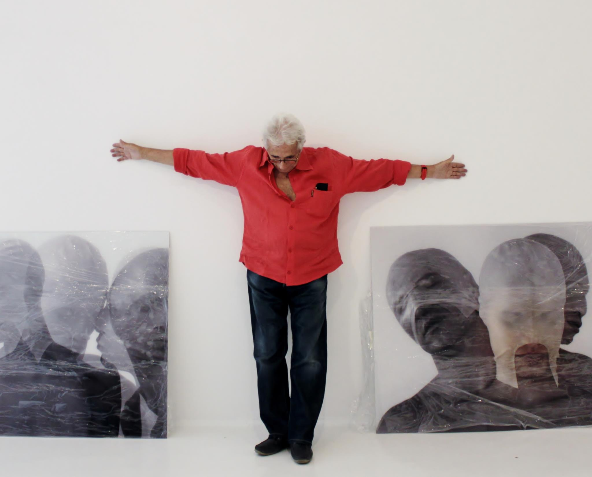 ritratto